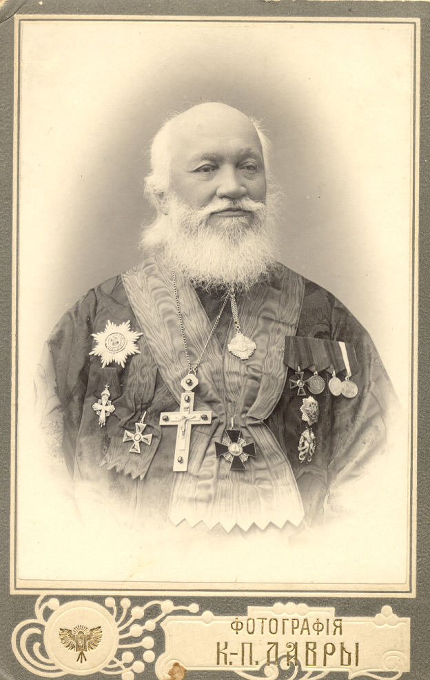 Протоиерей Николай Браиловский